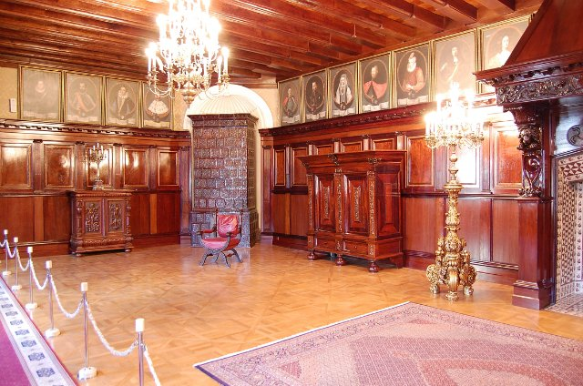 Нясвіжскі замак. Камінная зала.